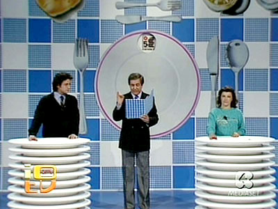 Corrado mentre legge la prima domanda nella prima puntata